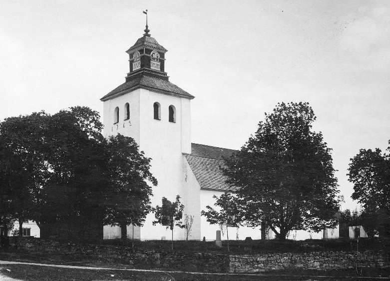 Värmskogs kyrka, Grums